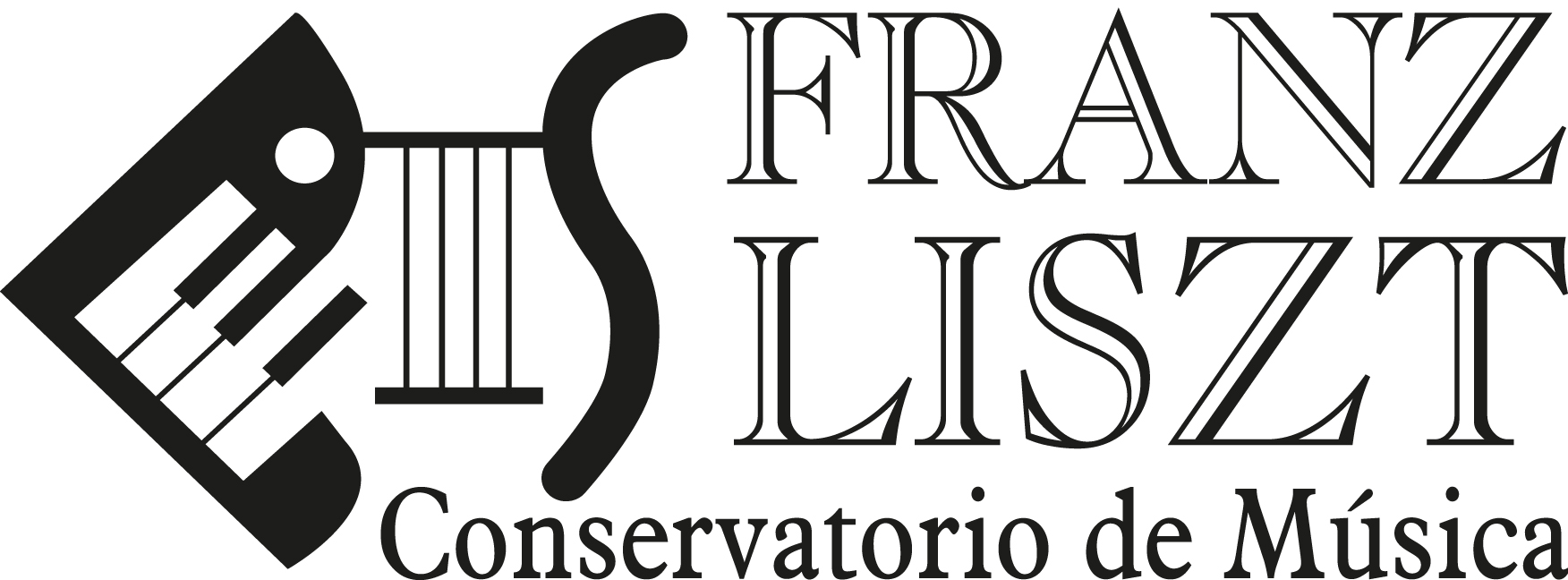 Conservatorio de Música Franz Liszt Quito